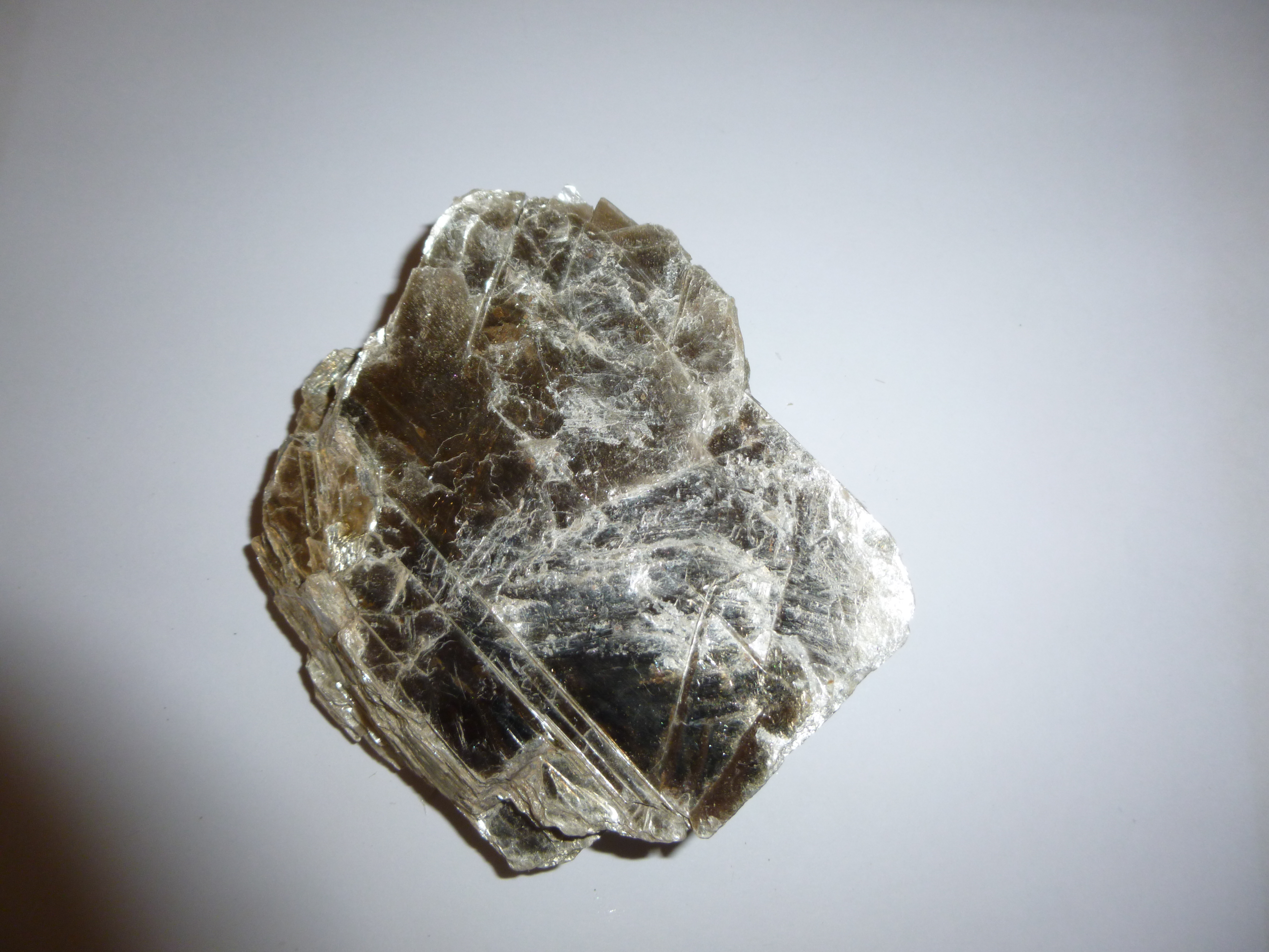 Moscovita Laminar, hallada en las cercanias de Playa "La Miel", Distrito de Quilca, Provincia de Camaná, Departamento de Arequipa, Perú.